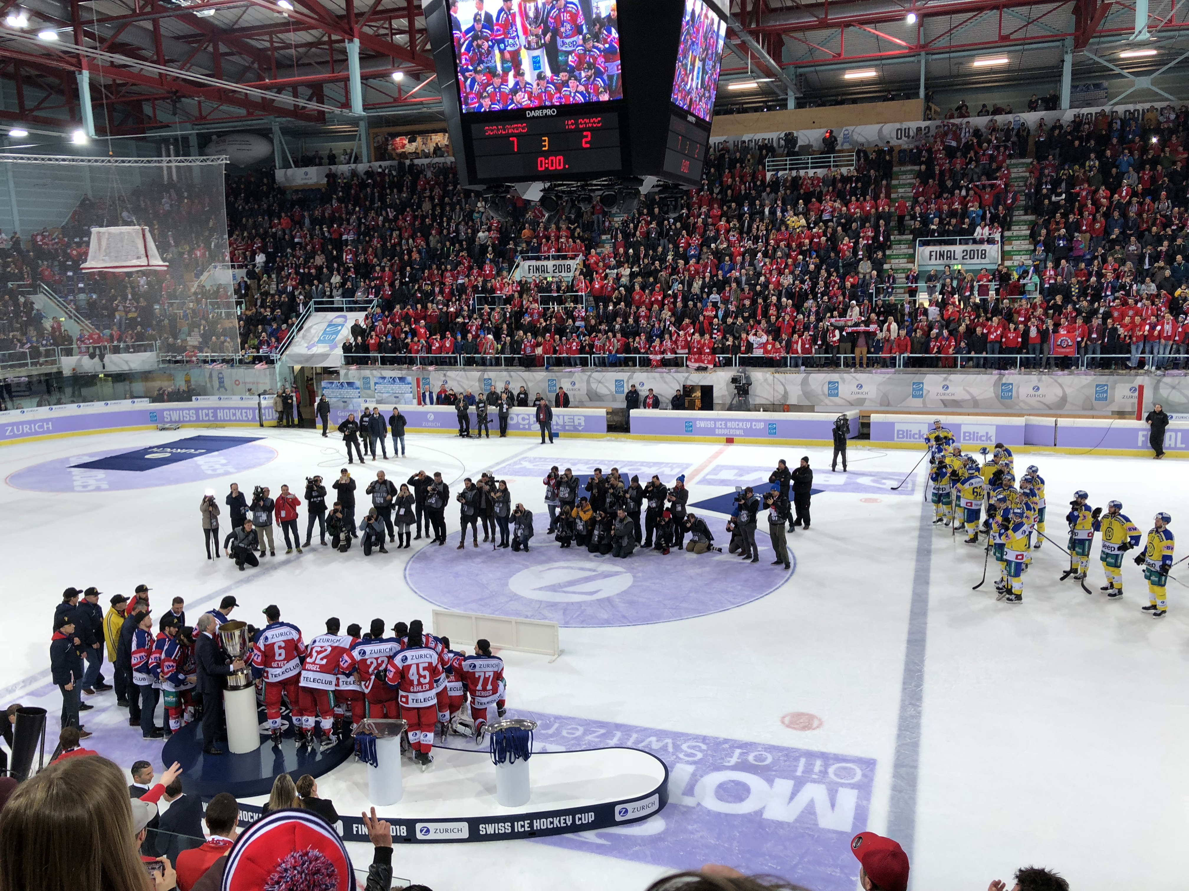 Siegerehrung nach dem Cup Final am 4. Februar 2018 – SC Rapperswil-Jona gegen HC Davos